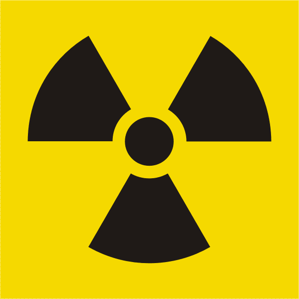 Símbolo de radiación según legislación española (que transpone las directivas europeas, que a su vez recoge las recomendaciones internacionales) Apéndice 4: Señalización de zonas, Real Decreto 1753/1987, Apéndice 4: Señalización de zonas, punto 3, Real Decreto 53/1992 y la legislación vigente en España Anexo IV: Señalización de zonas, punto 5 Real Decreto 783/2001.